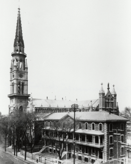 Église Saint-Jacques de Montréal avant la construction de l'UQAM